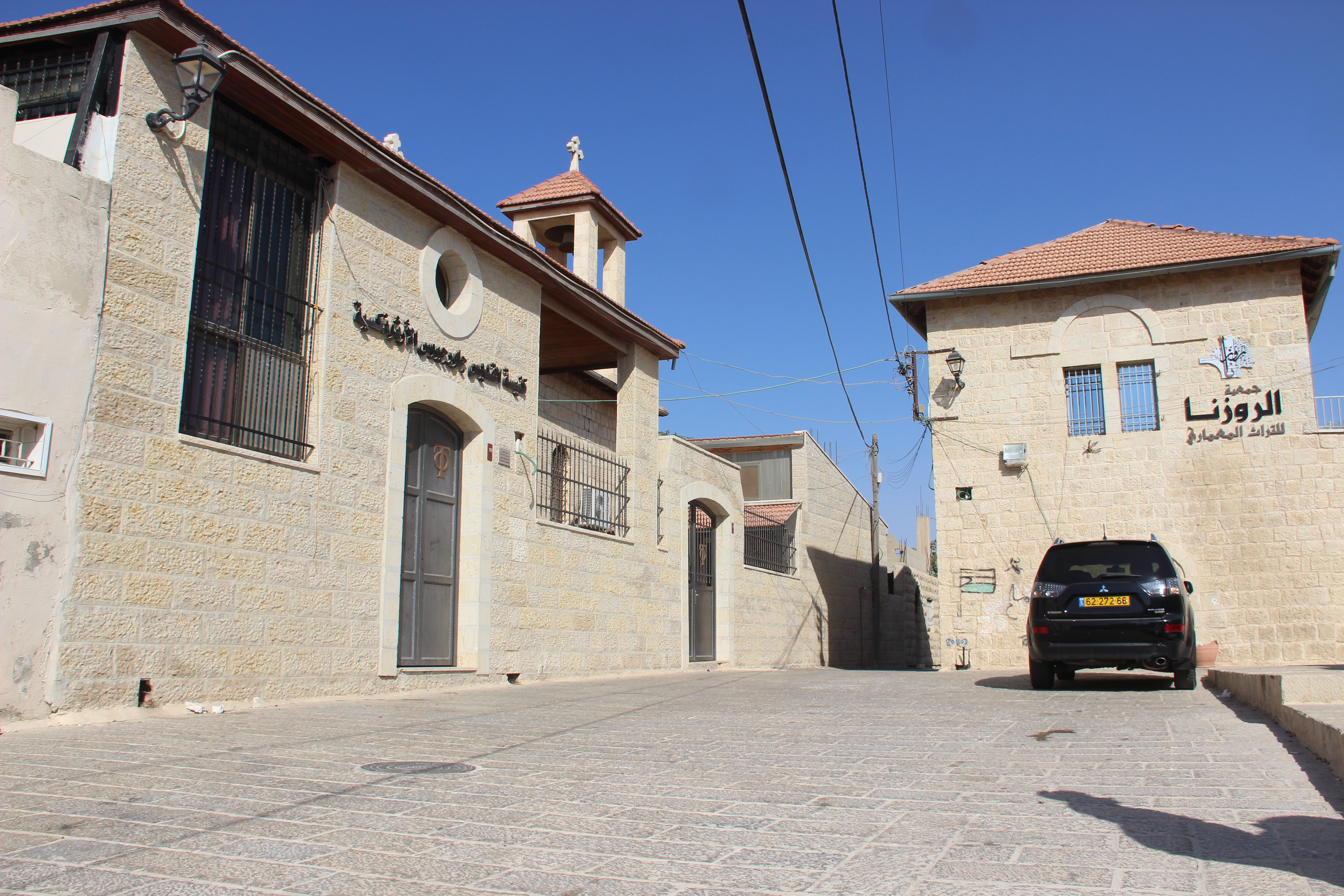 كنيسة القديس جاورجيوس الأرثوذكسية في بيرزيت القديمة